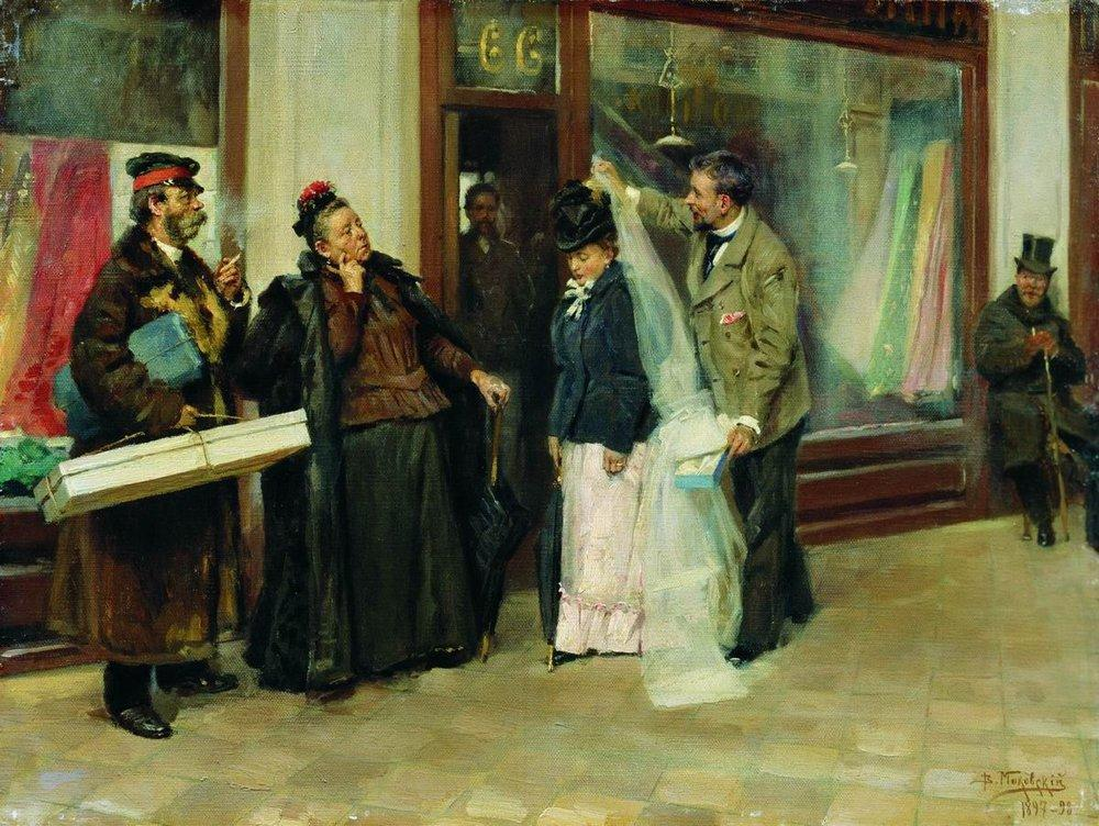 Выбор приданого. 1897-1898 Холст, масло Харьковский художественный музей, Украина